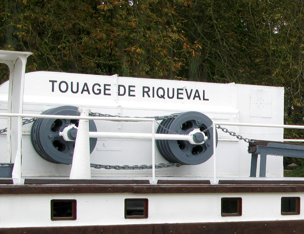 Riqueval, hameau de Bellicourt (Aisne, France) - Le touage. Le Musée du touage est installé dans l'ancien toueur, visible à l'entrée de l'"Office de tourisme du Vermandois". .